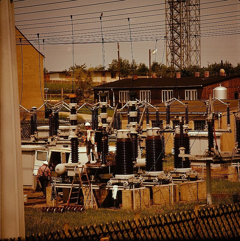 Original image description from the Deutsche Fotothek Versuchsanlage Hermsdorf